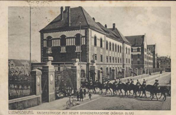 Ludwigsburg: damalige Königin-Olga-Kaserne in der Kaiserstraße